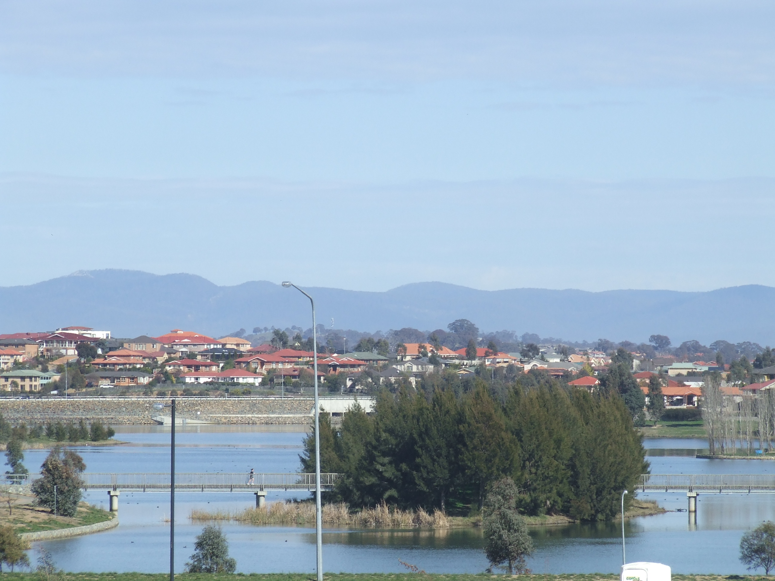 Yerrabi Pond, Amaroo, ACT